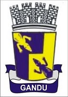 brasão